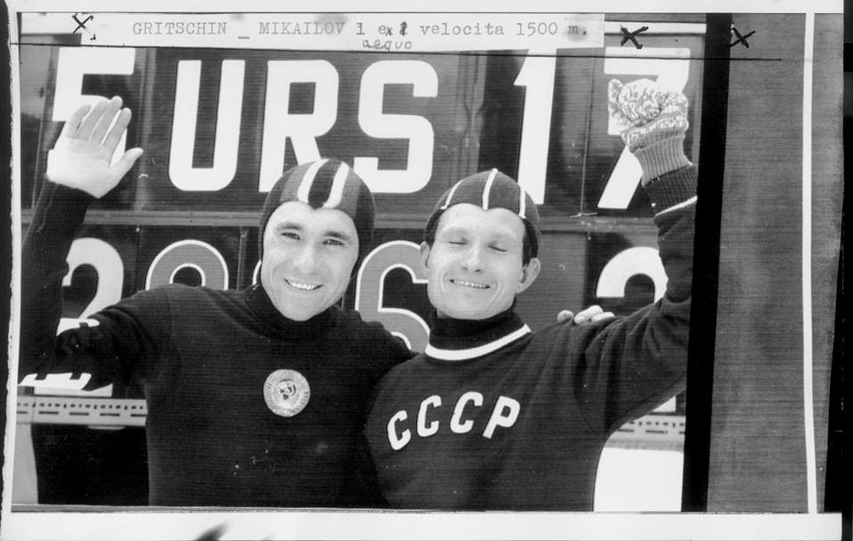 Evgenij Grišin e Jurij Michajlov dopo aver battuto ex aequo il record mondiale di pattinaggio di velocità sui 1.500 metri alle Olimpiadi invernali di Cortina 1956